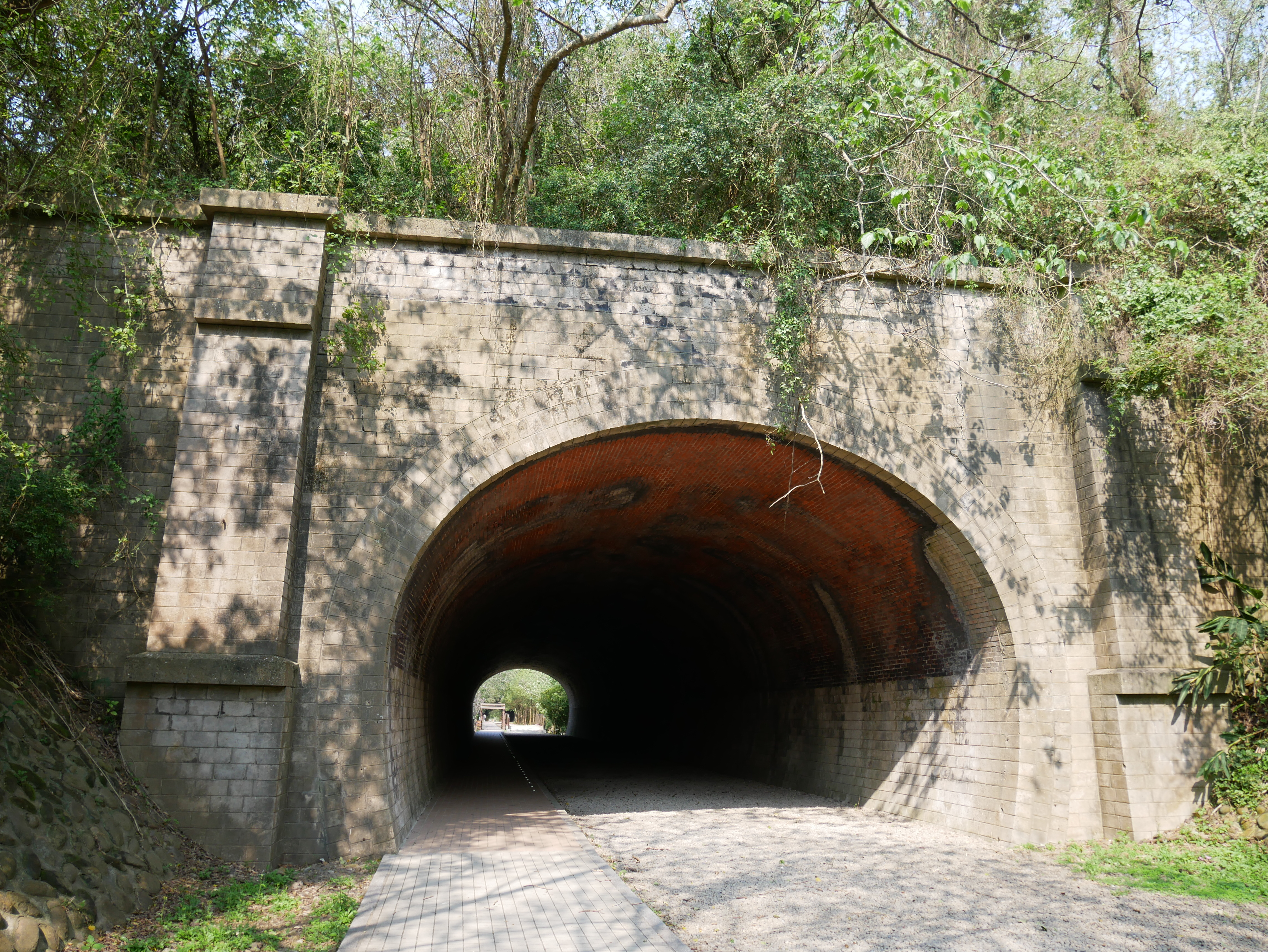 中文（台灣）: 崎頂二號隧道，苗栗縣竹南鎮崎頂里